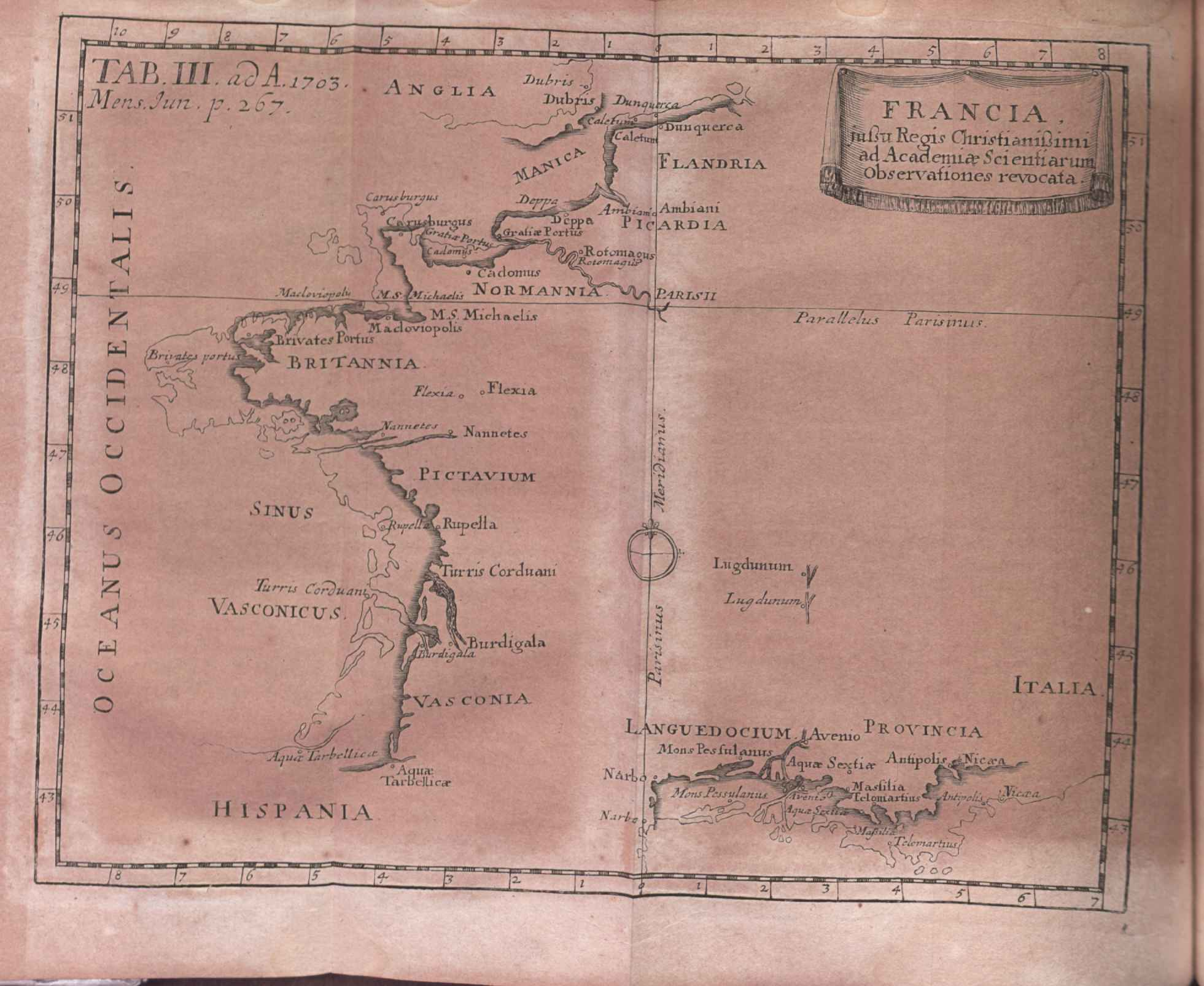 Illustration